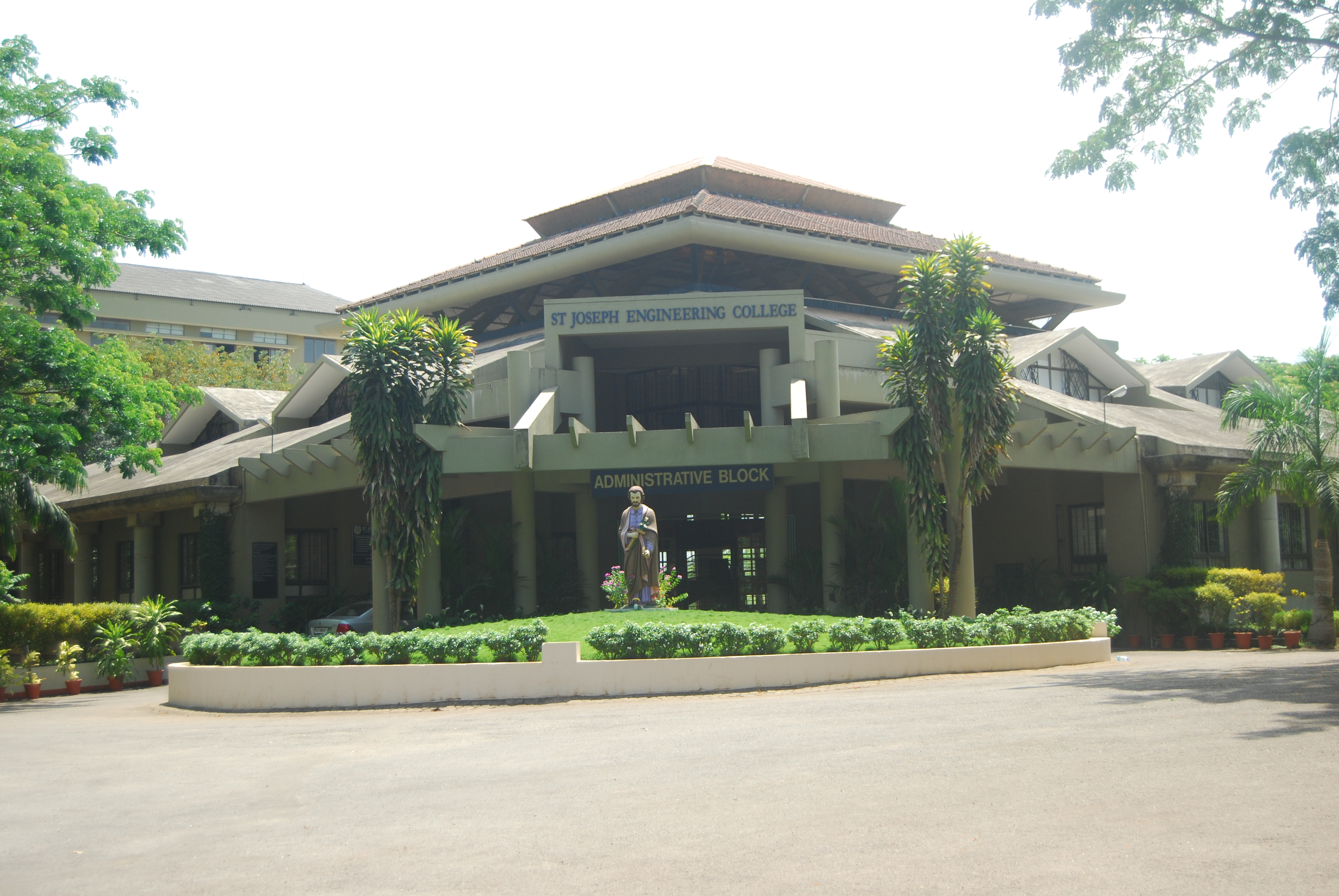 ಕನ್ನಡ: ಸಂತ ಜೋಸೆಪರ ತಾಂತ್ರಿಕ ಮಹಾ ವಿದ್ಯಾಲಯ ಮಂಗಳೂರು